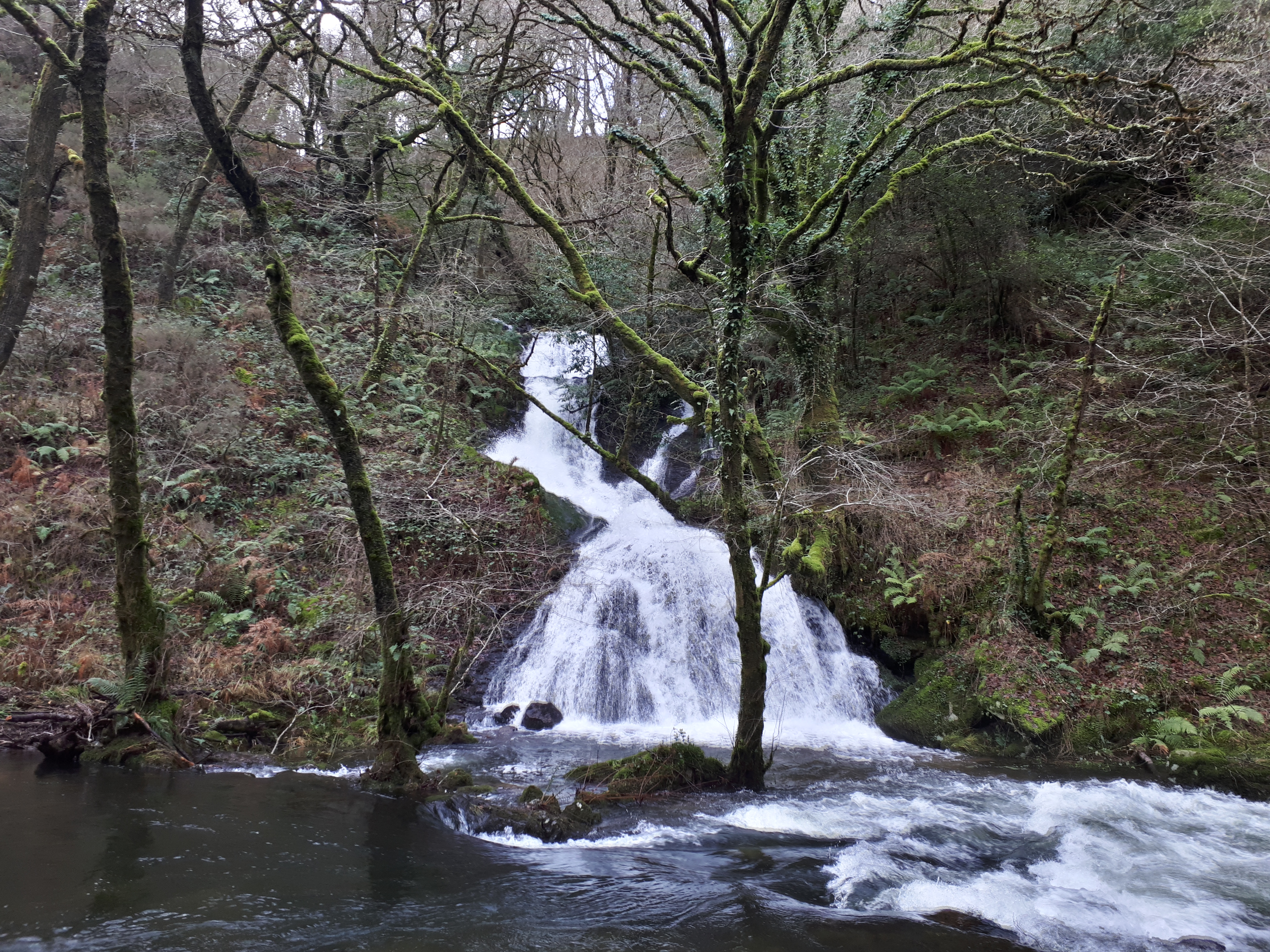 Cascada en A Aldea Grande.